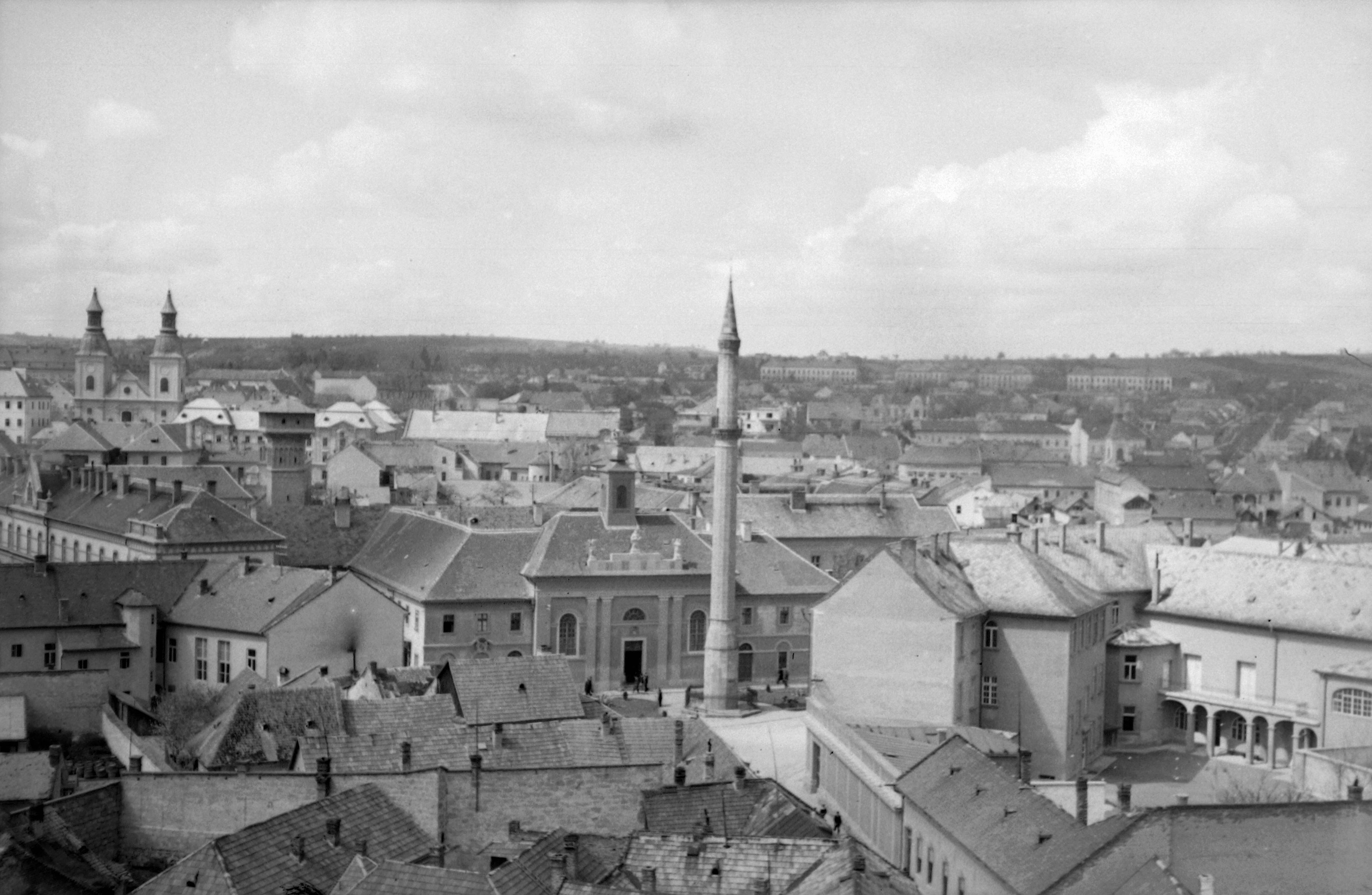 látkép a várból. A római katolikus templom (volt irgalmasok temploma) előtti téren a Minaret. Location: Hungary, Eger Title: látkép a várból. A római katolikus templom (volt irgalmasok temploma) előtti téren a Minaret.